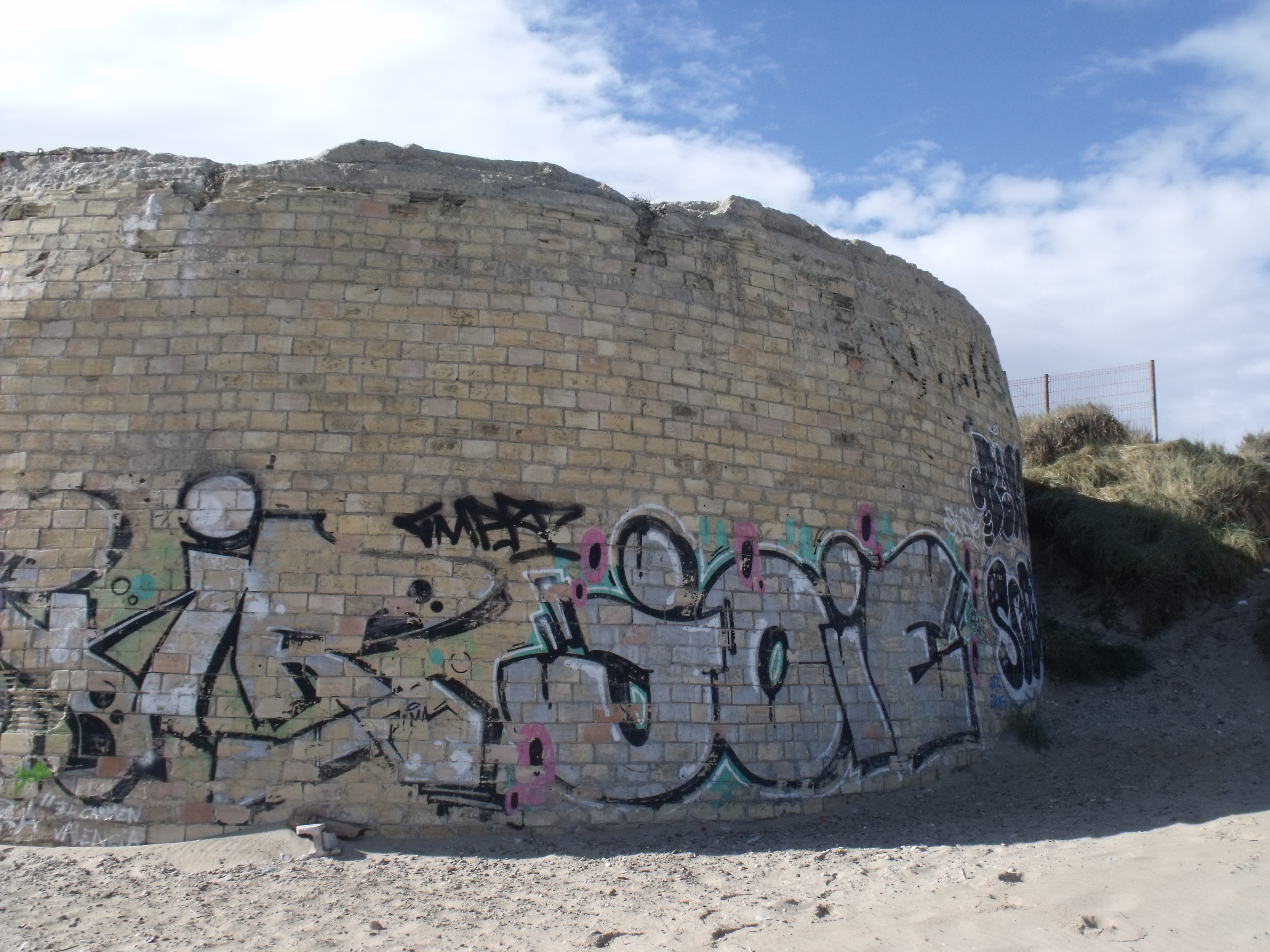 Batería republicana de El Saler. Vista por un lateral.